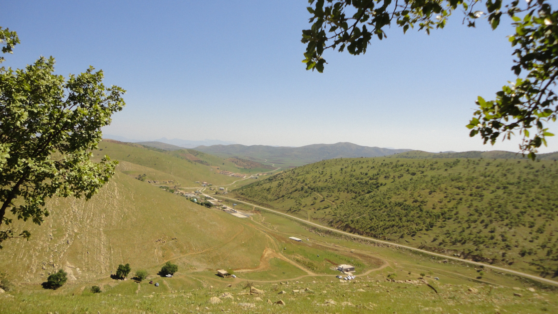 کوردی: گوندی بەرزنجە